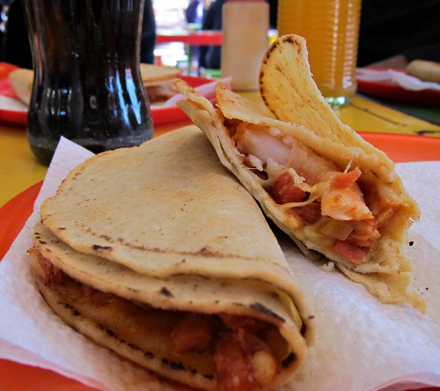 Quesadilla de Marlin, Cahuamanta Checo, Hermosillo, Mexico.